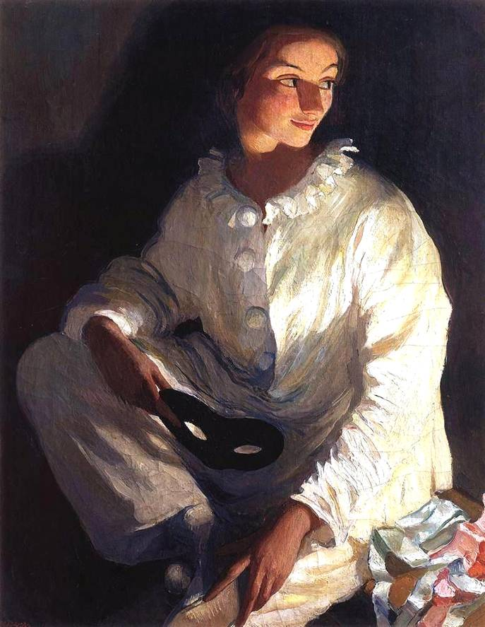 Холст, масло. Одесский художественный музей, Украина